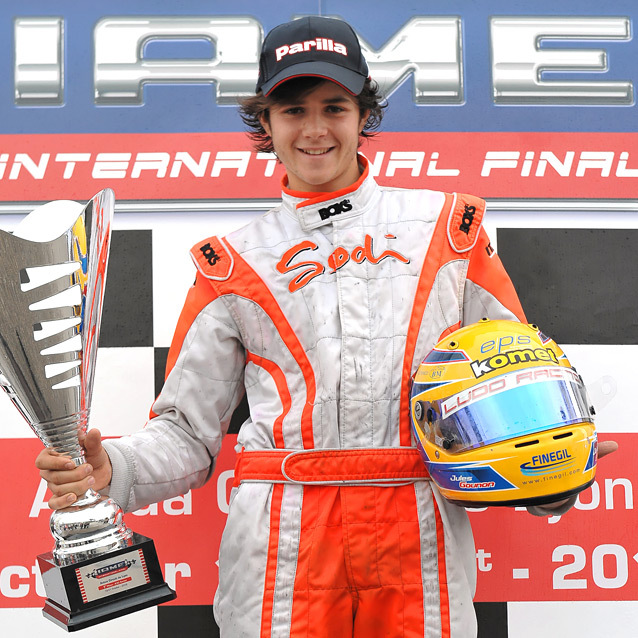 Photographie de Jules Gounon avec son casque et son trophée de champion du monde de karting 2012.